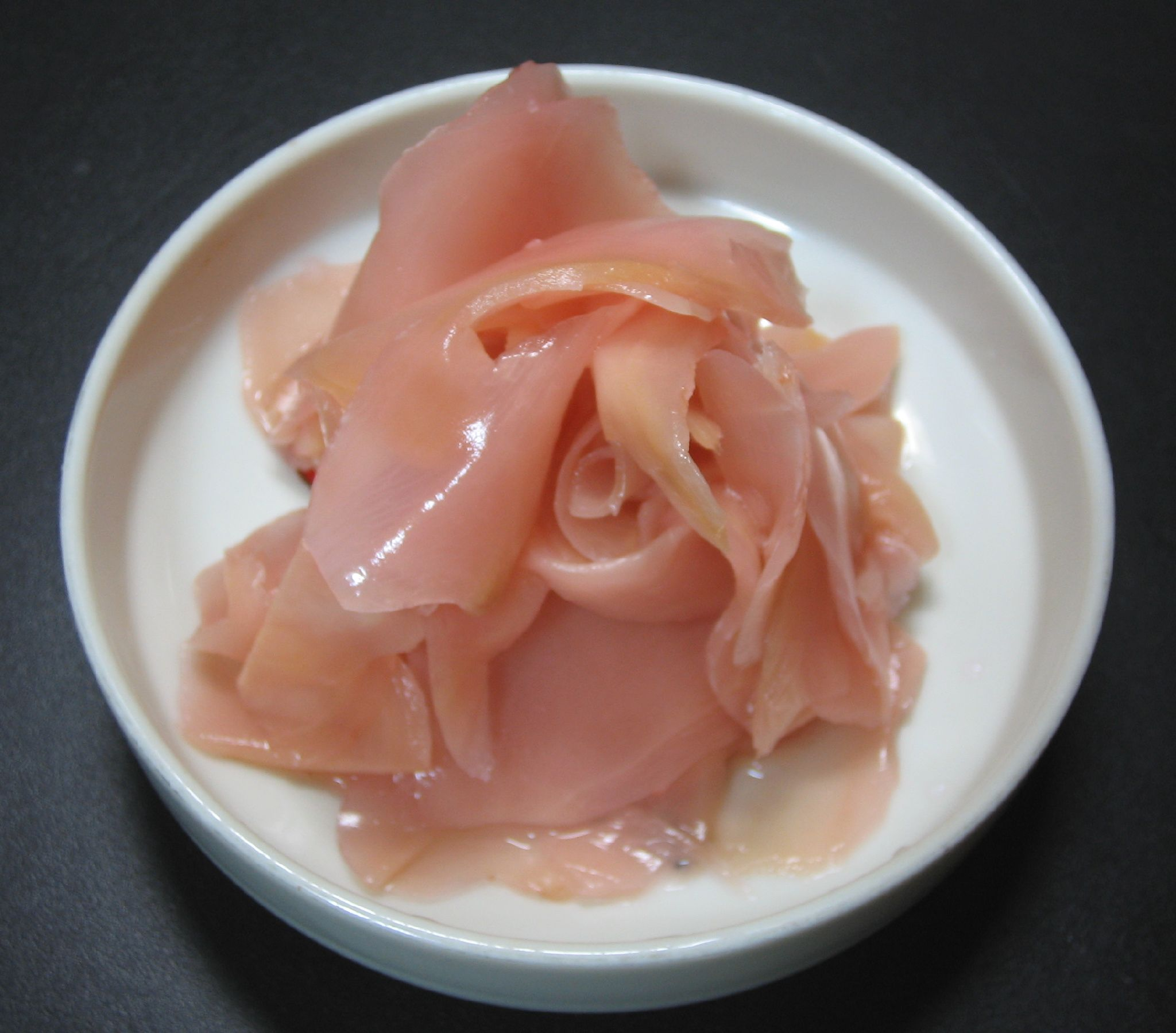 Gari (A japanese pickled ginger.) ガリ。